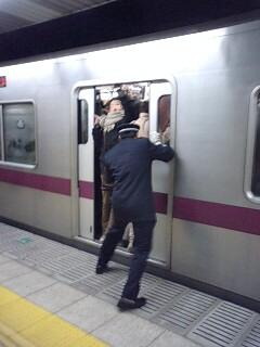 Tokyu Den-en-toshi line Sangenjaya station